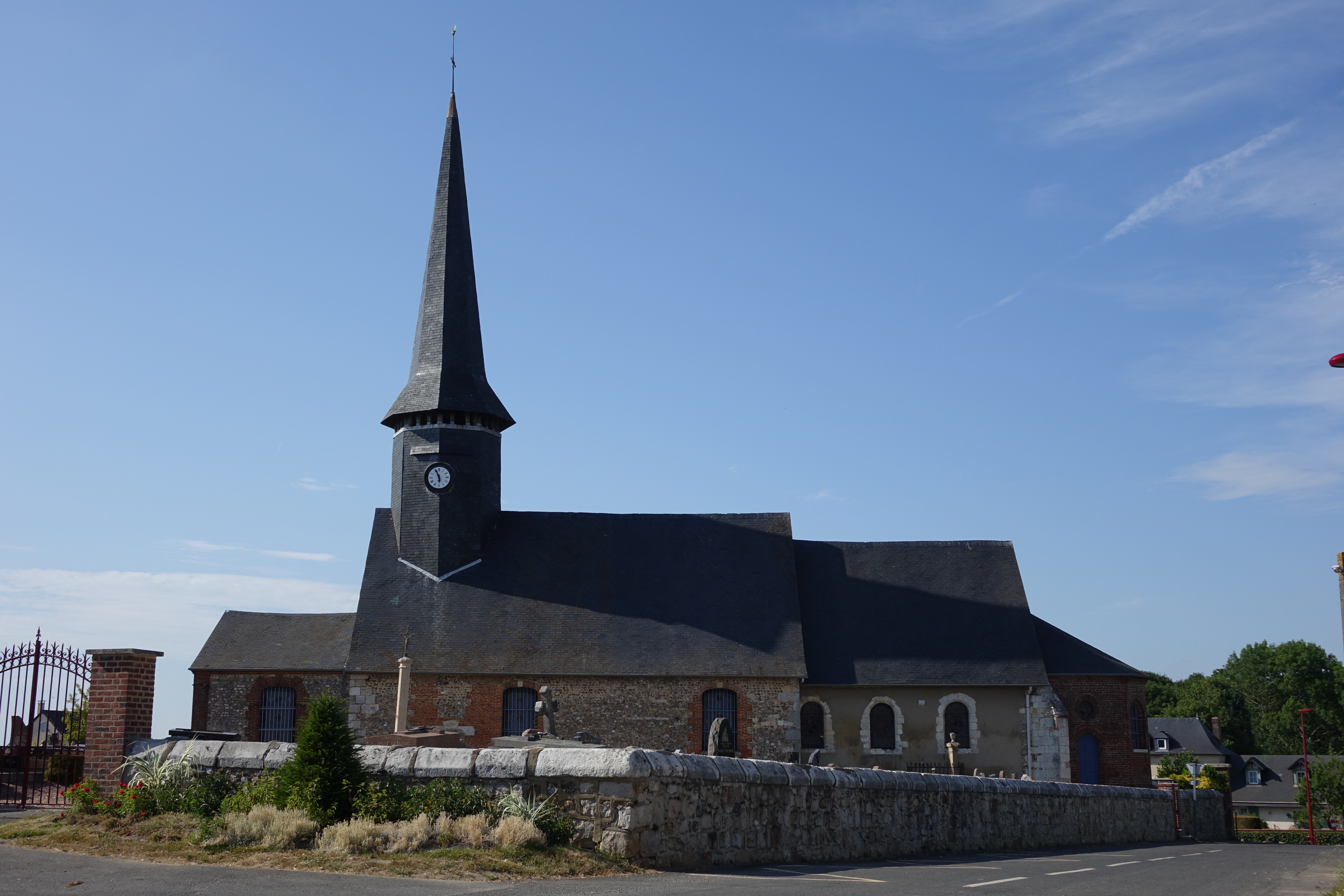 Église Notre-Dame d'Auzouville-sur-Ry, Seine-Maritime, France